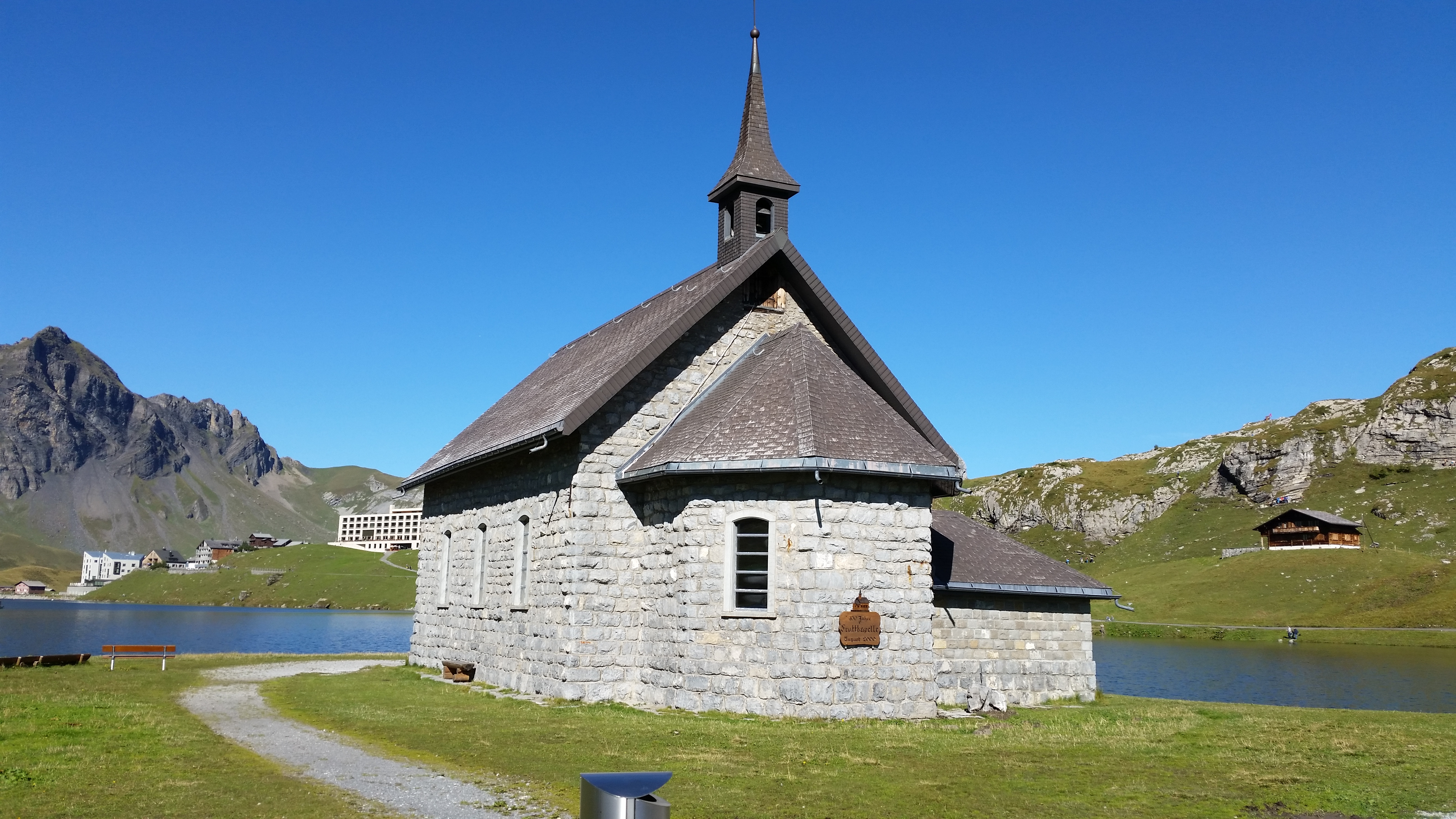 Kapelle